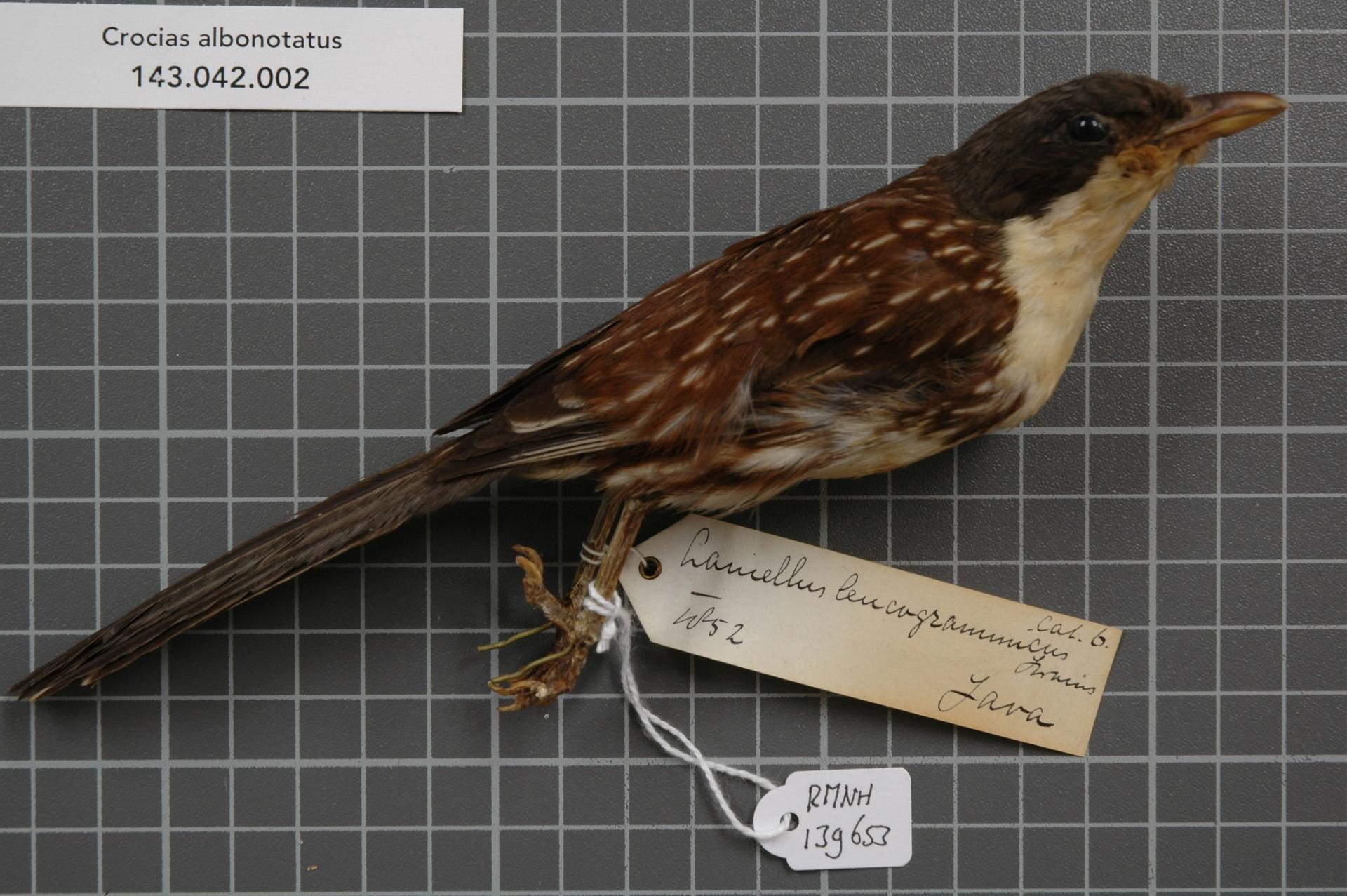 Crocias albonotatus (Lesson, 1832)